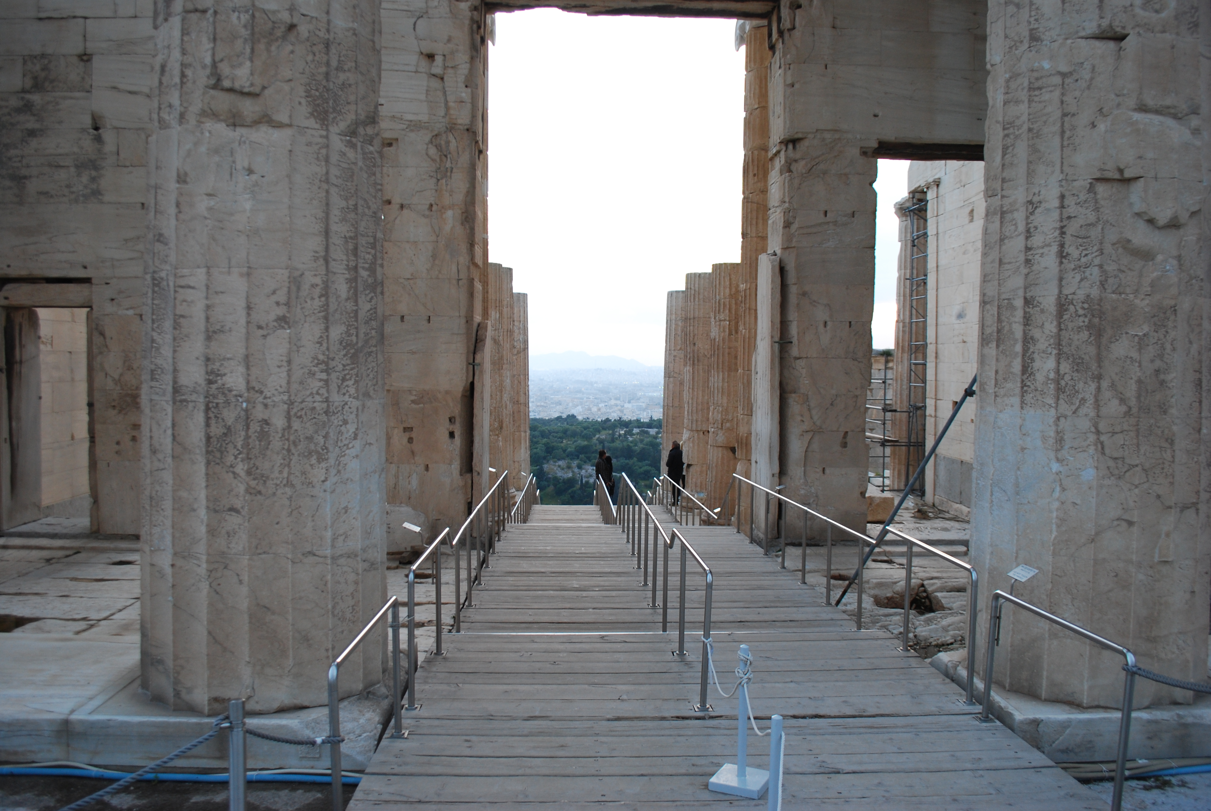 Vue de l'Acropole d'Athènes.